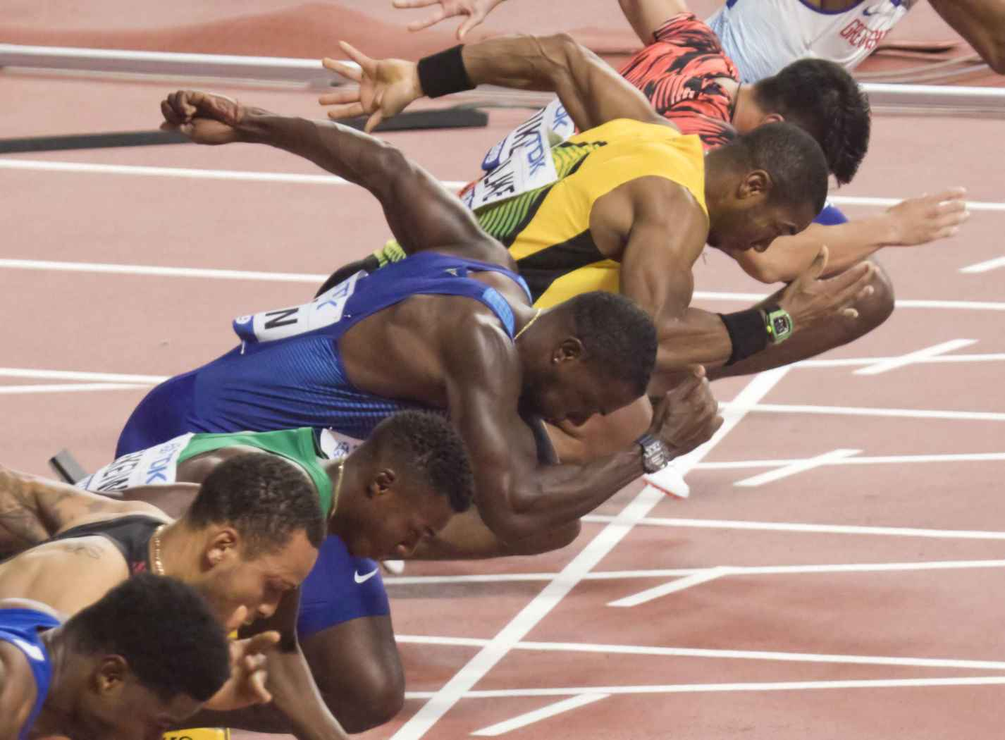 DOH20121 100m semi blake gatlin